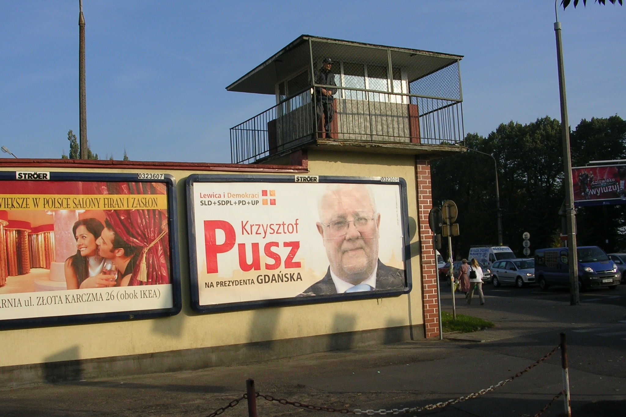 Areszt Śledczy Gdańsk (wieża) przed wyborami samorządowymi w 2006 roku, Krzysztof Pusz.